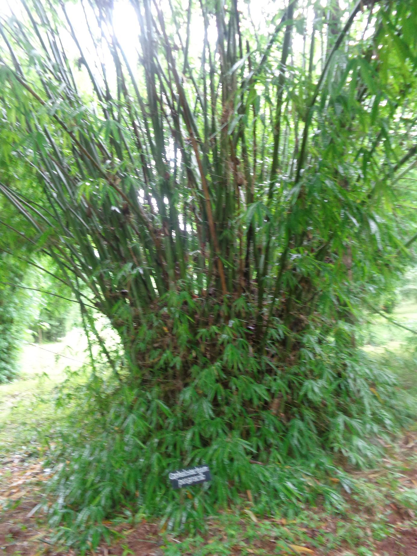 തൃശ്ശൂരിൽ പലപ്പിള്ളി വേലുപ്പാടത്തെ കേരള വനഗവേഷണകേന്ദ്രത്തിലെ തോട്ടത്തിൽ നിന്നും ഏടുത്തത്. താഴെ സ്ഥാപിച്ചിട്ടുള്ള ഫലകങ്ങളും കാണാം.